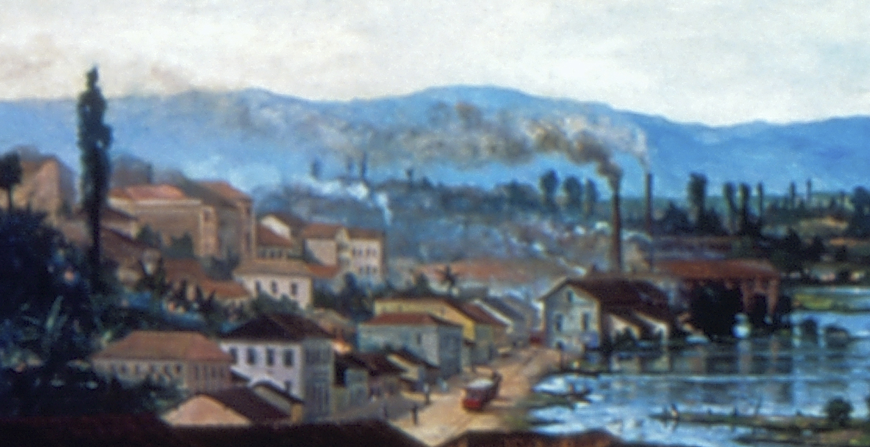 Obra que integra o acervo do Museu Paulista da USP. Coleção Benedito Calixto de Jesus - CBCJ